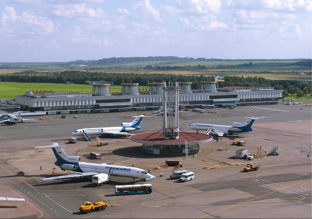 Pulkovo Airport in St Petersburg, Russia